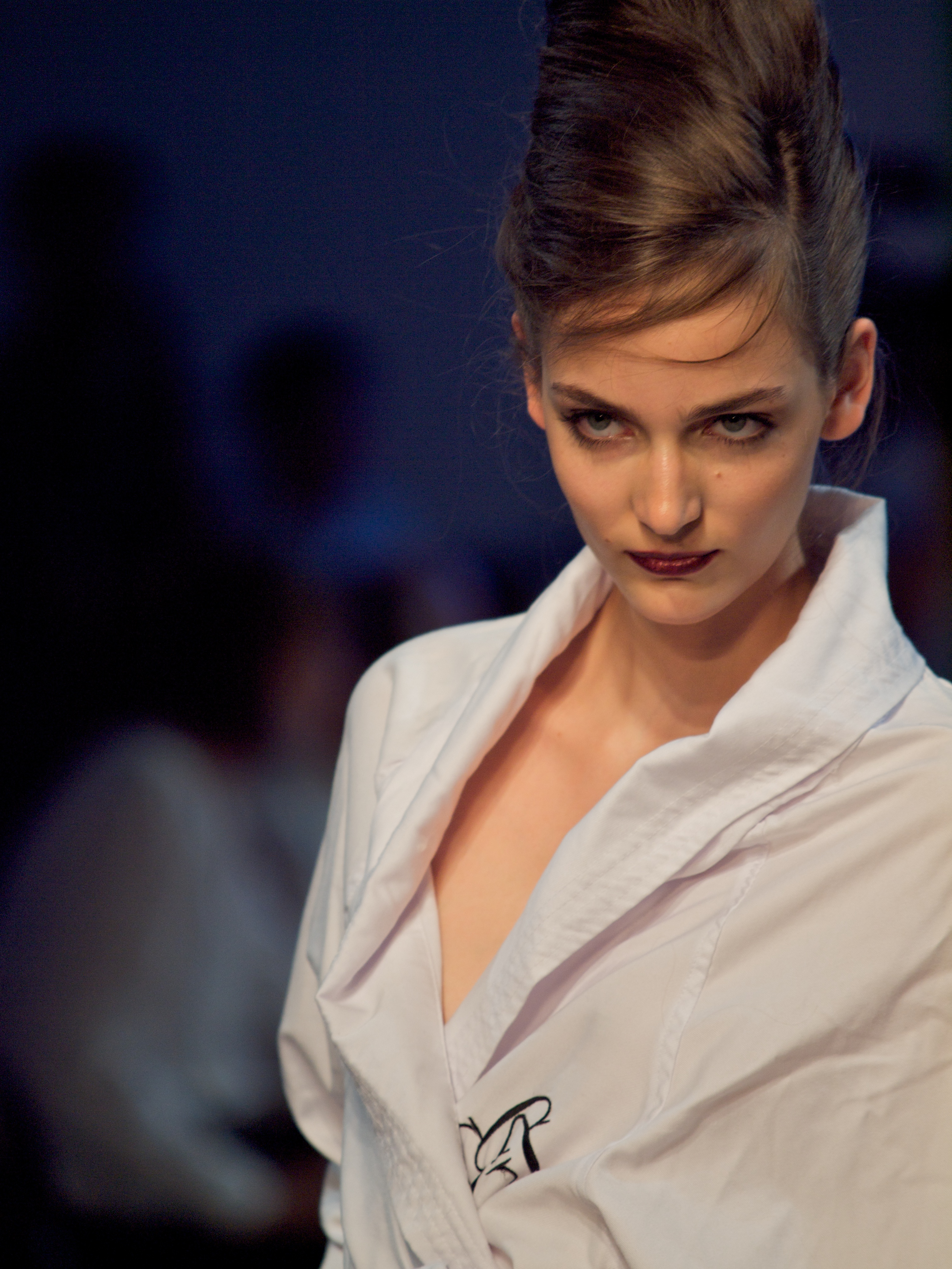 Haute Couture Autumn/Winter 2010-2011